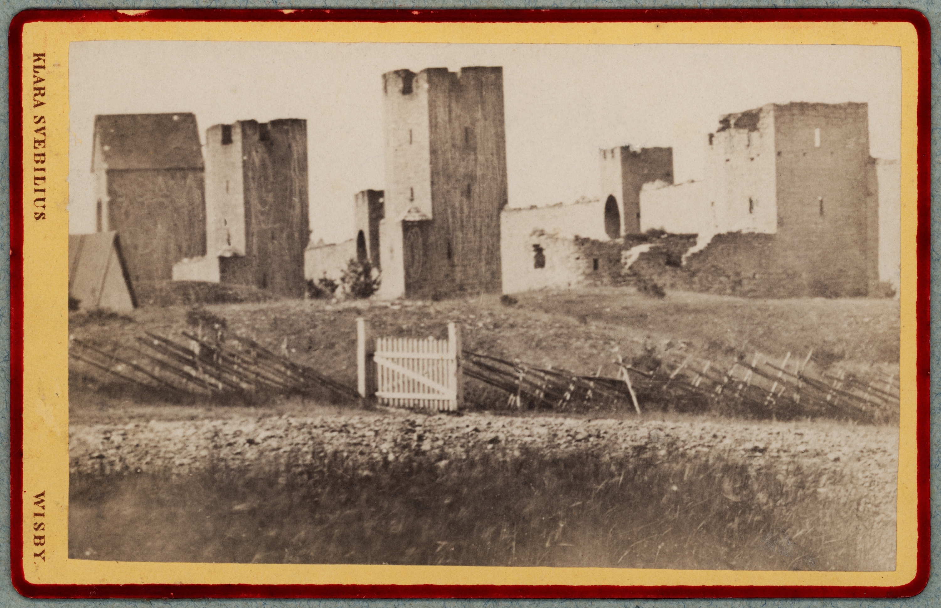 Wisby. Nordöstra muren 1800-talets andra hälft.